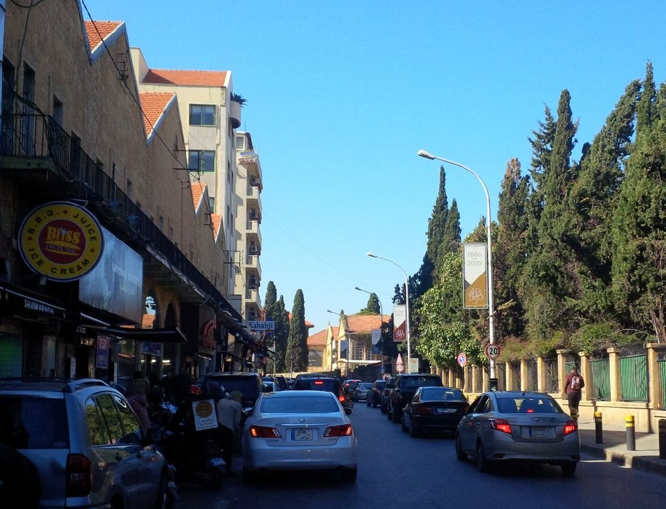 شارع بليس المحاذي للجامعة الأميركية في بيروت